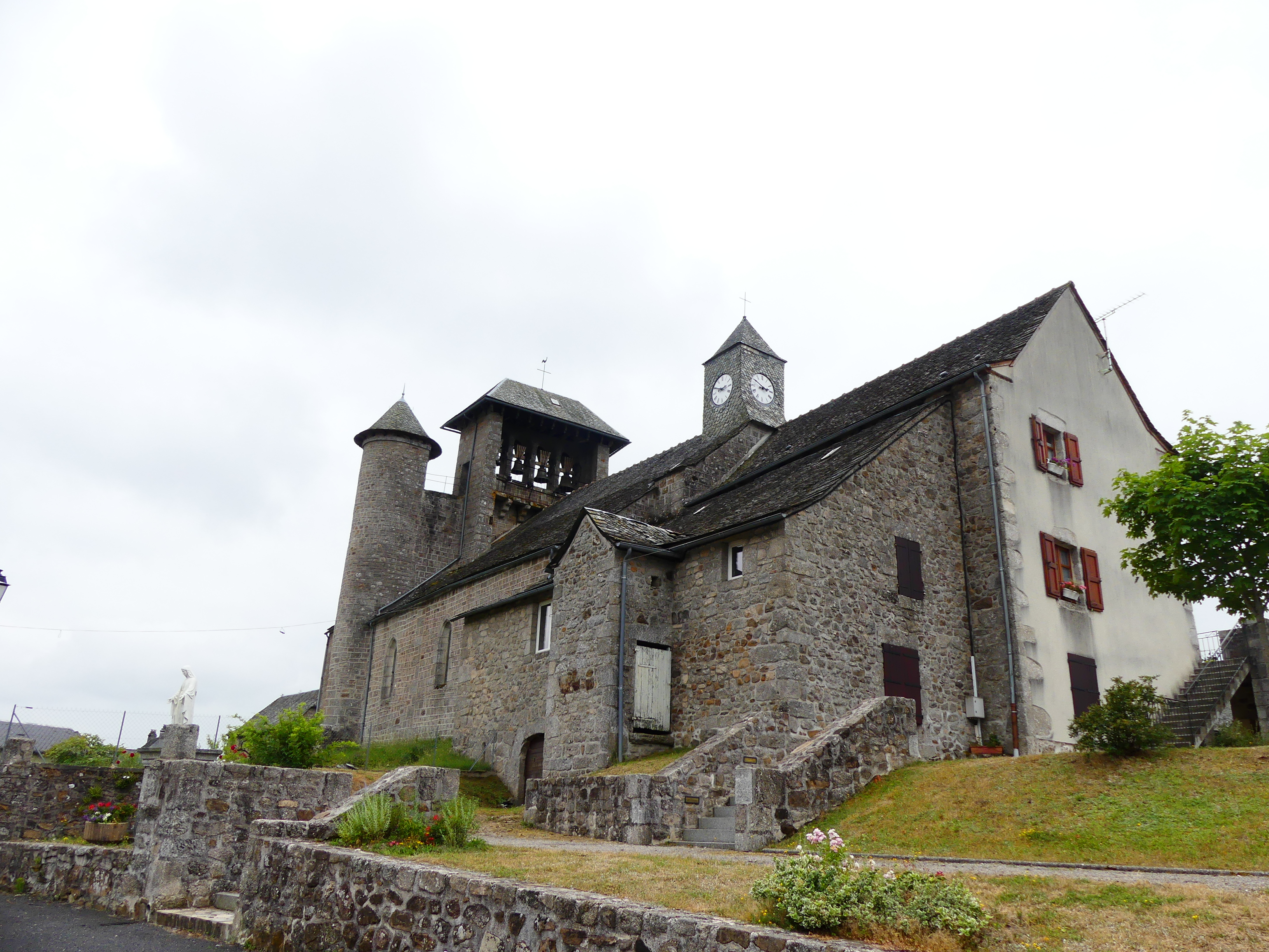 L'église de Florentin, Florentin-la-Capelle, Aveyron, France.